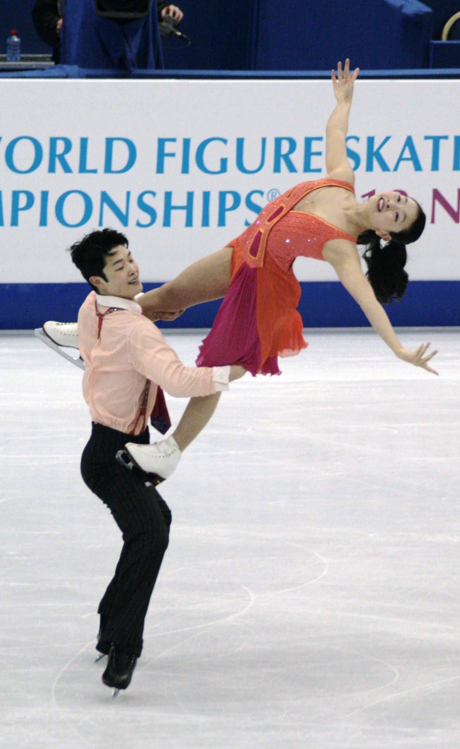 Майя Шибутани и Алекс Шибутани (США) на чемпионате мира по фигурному катанию 2012